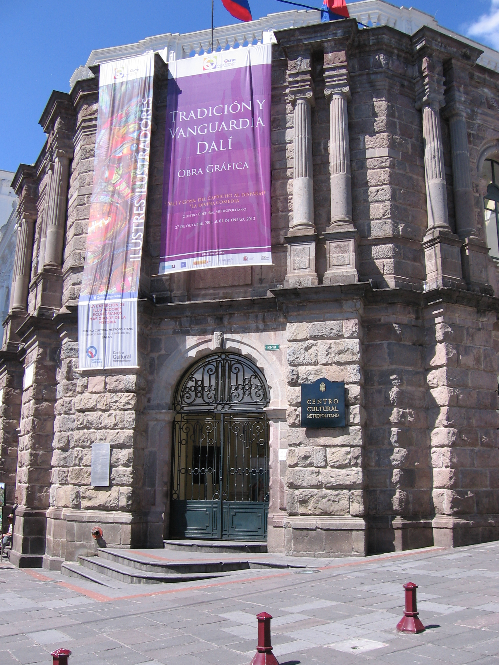 Centro Cultural Metropolitano Quito (García Moreno y Espejo)